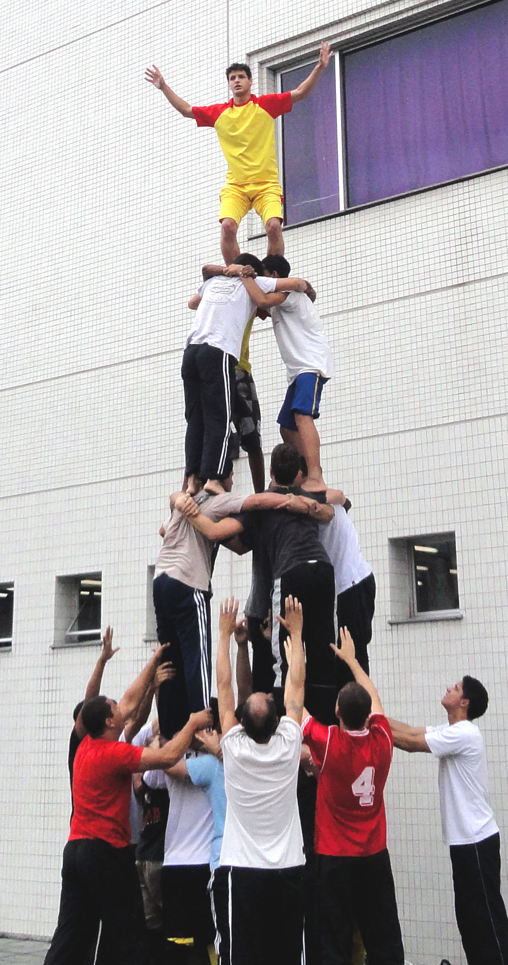 四段円塔。リオデジャネイロでの練習風景